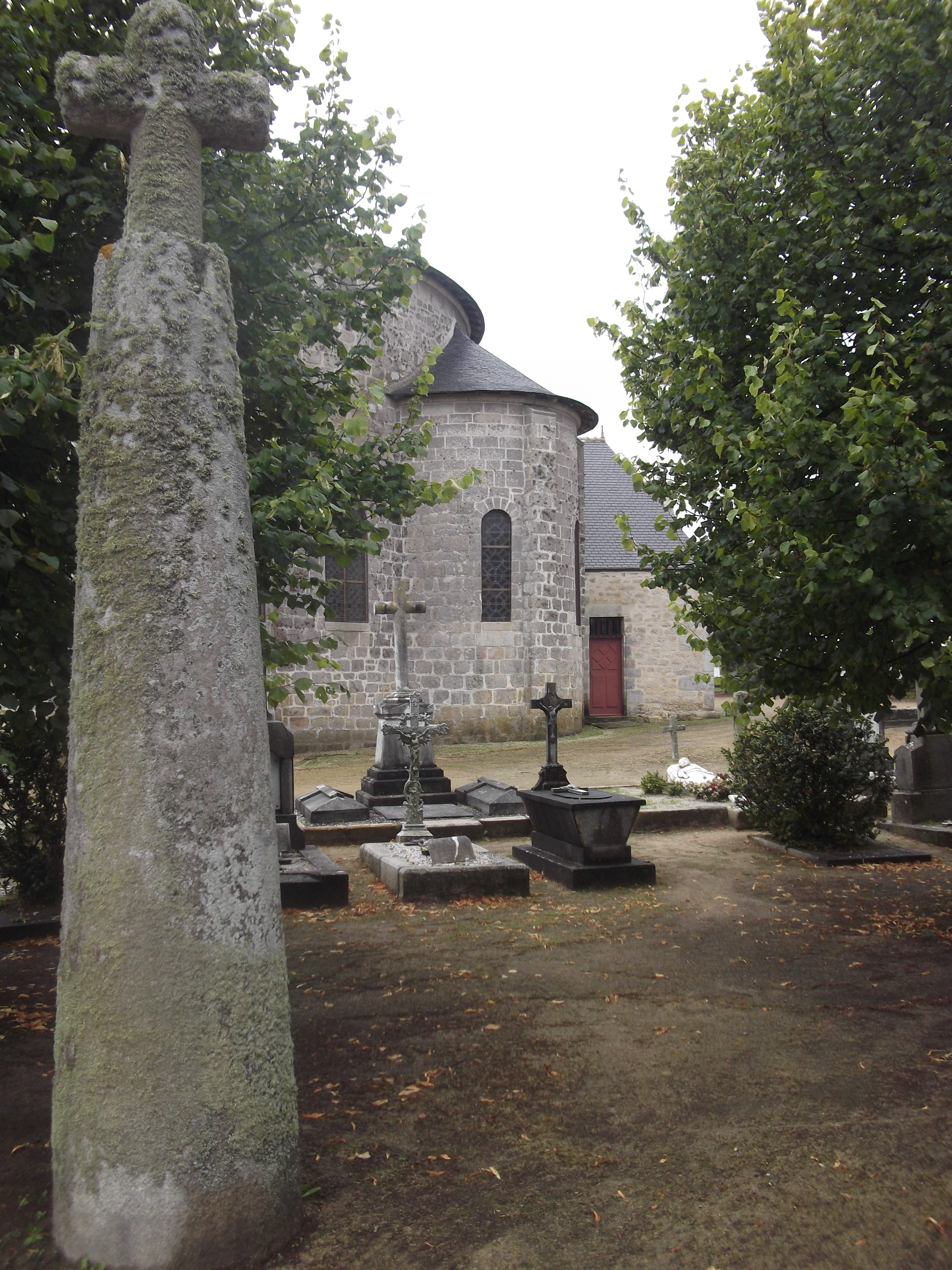 Stèle tronconique cannelée (Ier millénaire avant J.C.) ; granite